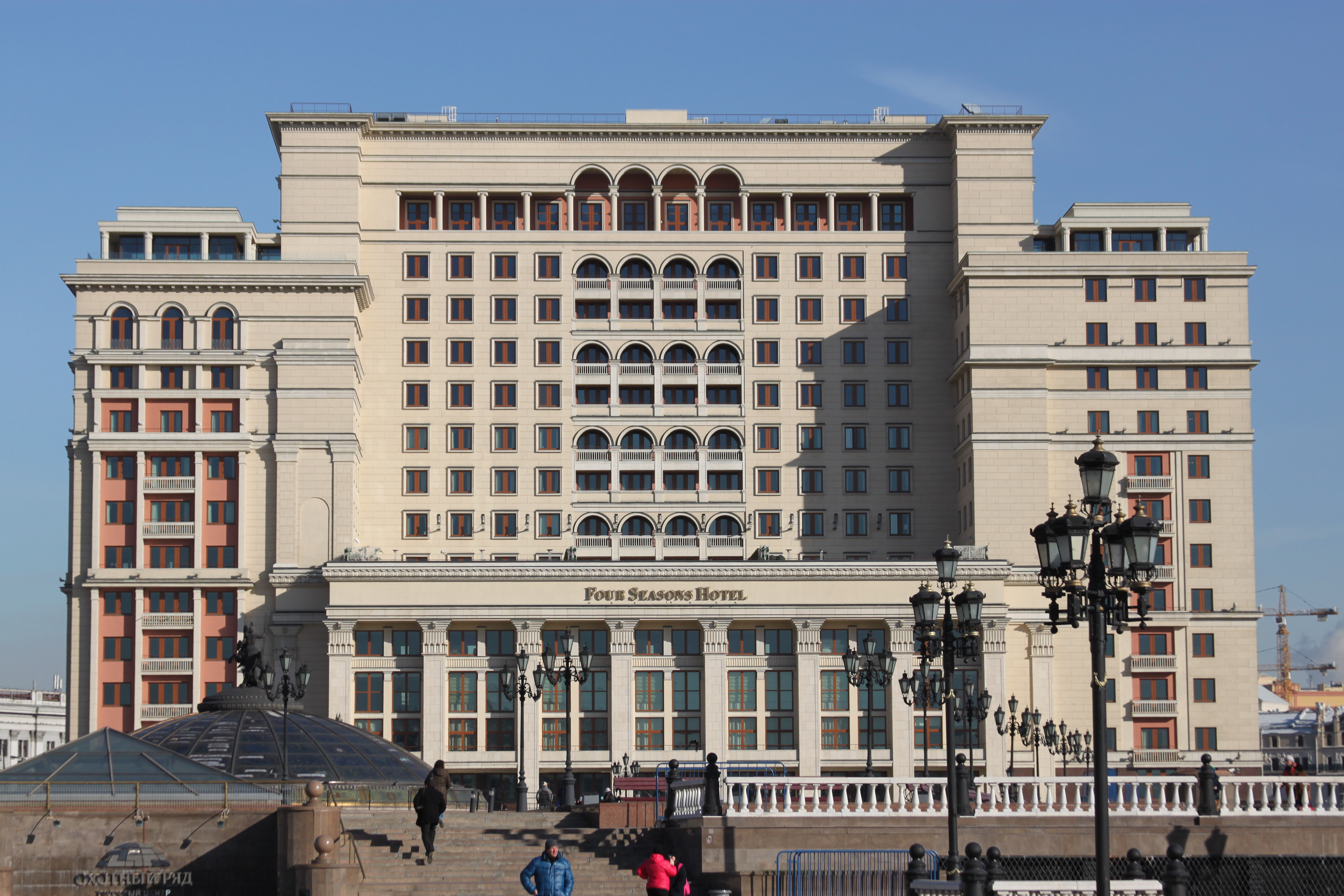 2014 Moscow Four seasons Hotel Москва Отель "4 Seasons". Охотный ряд